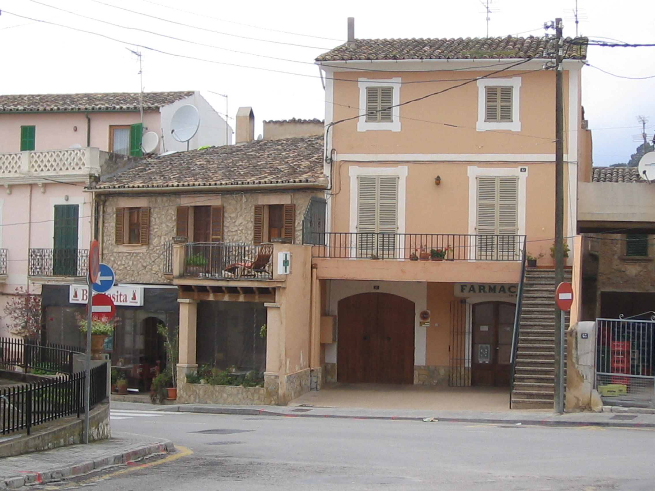 A spanish village called Calvià in Mallorca.